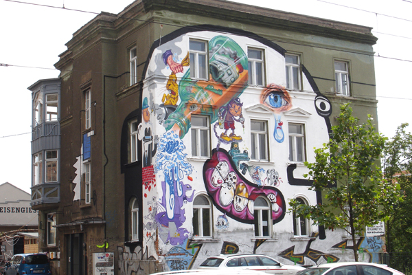 Rundumbemalung der Grünen Villa des Westwerks Leipzig in der Karl-Heine-Straße 93 von Kay Schwarz 157